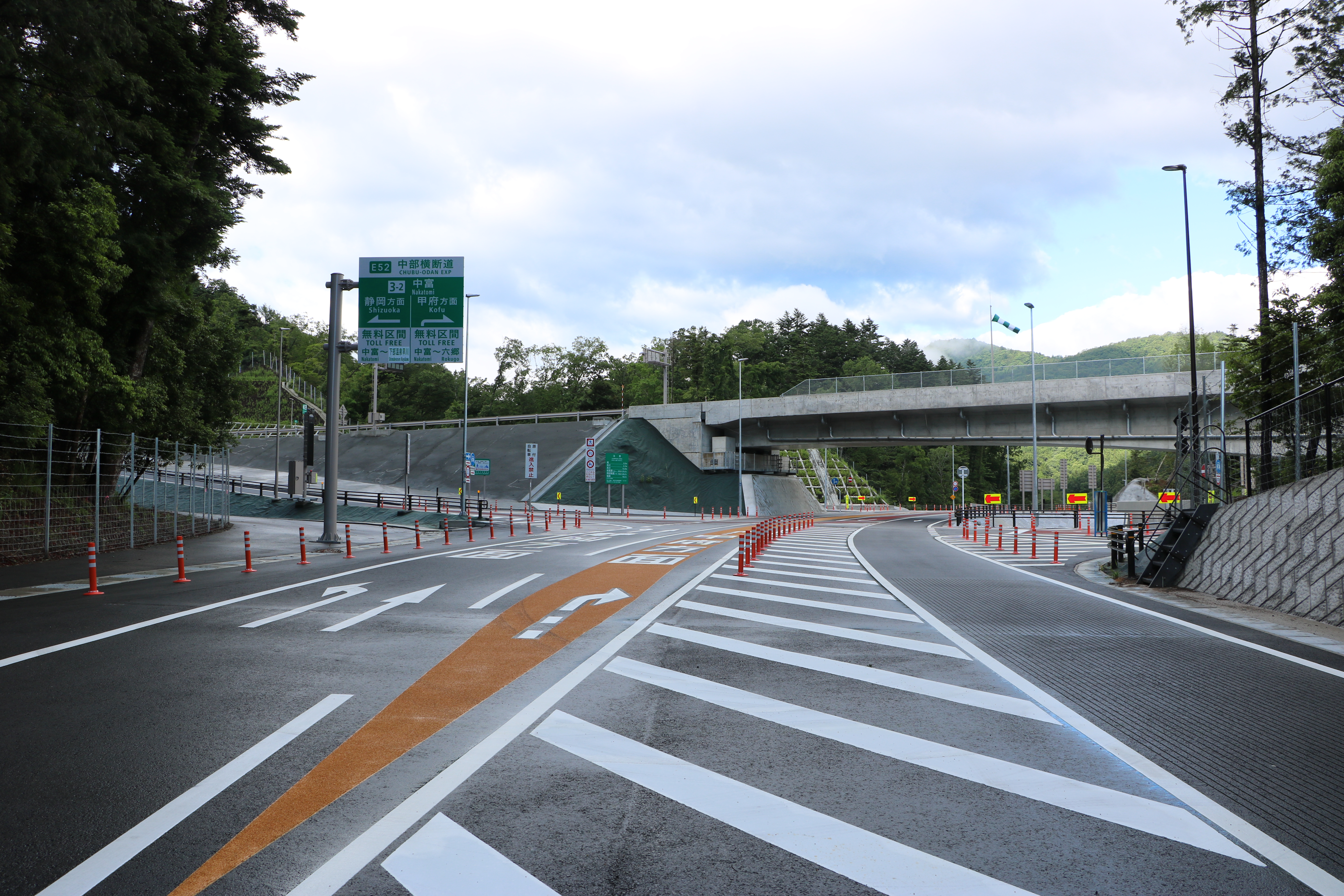 中部横断自動車道中富インターチェンジ入口。山梨県南巨摩郡身延町。